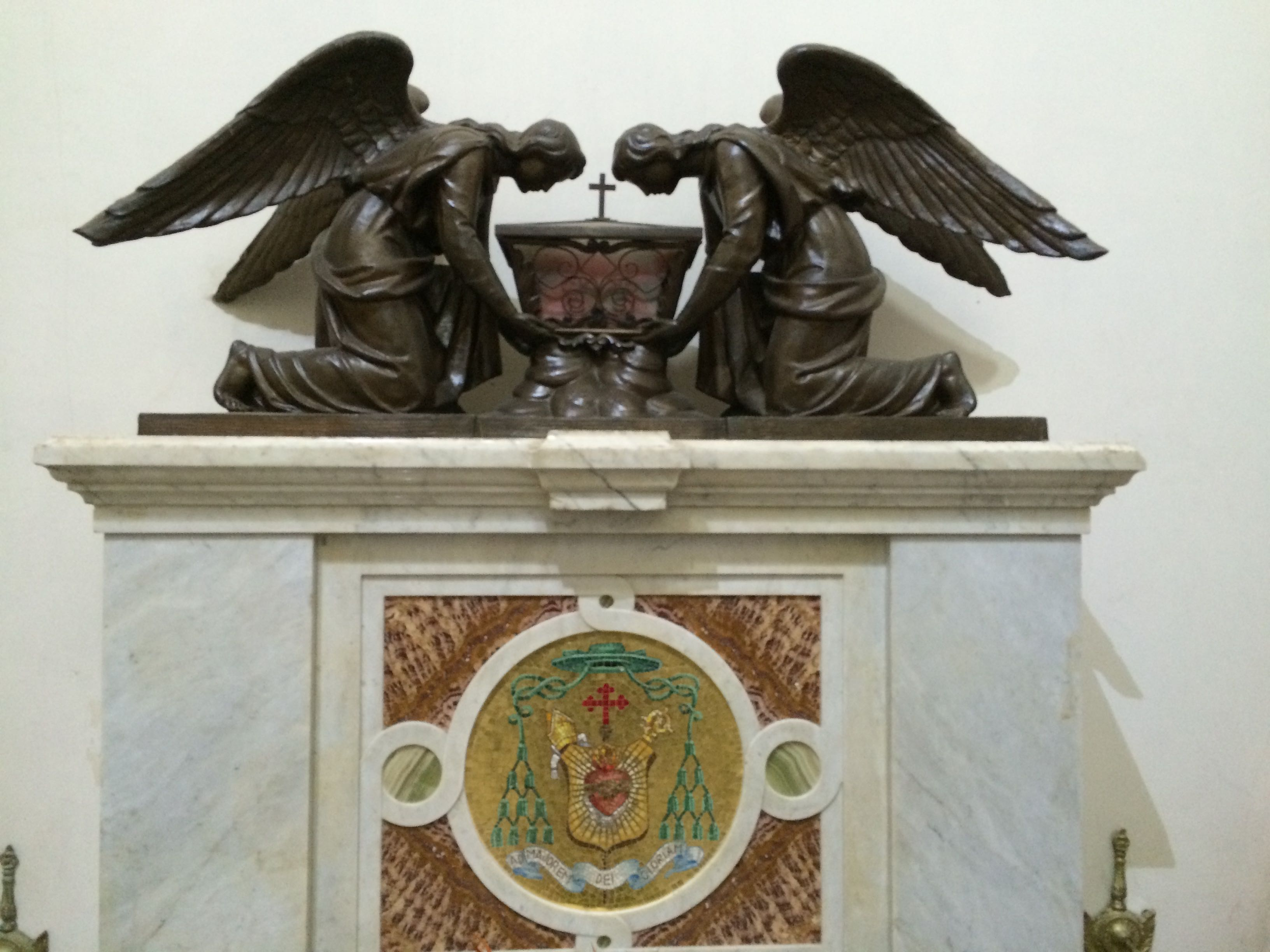 SANTA ROSA DE OSOS ANTIOQUIA - DETALLES DEL INTERIOR DE LA CATEDRAL Esta fotografía fue tomada en el municipio colombiano con código 05686.